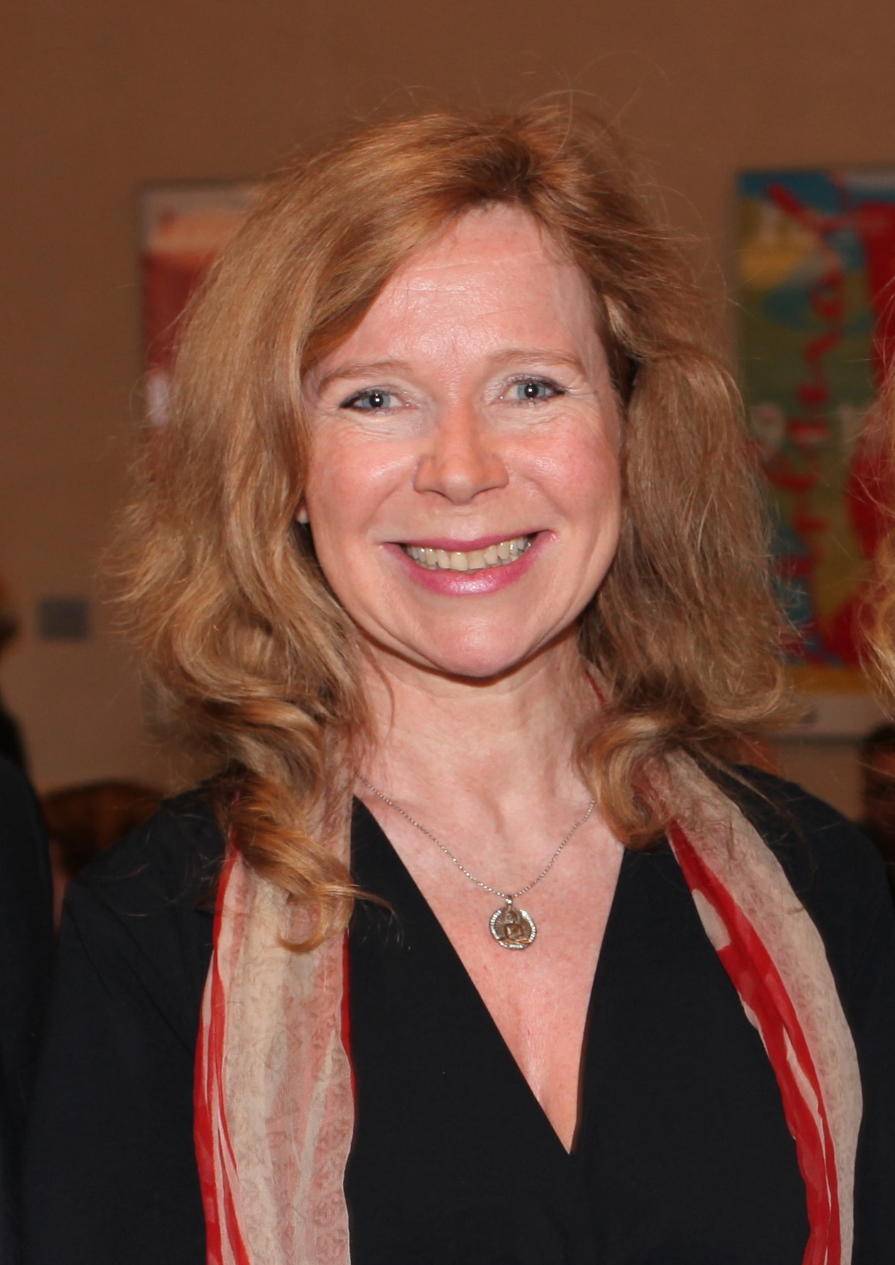 Marion Kracht, Berlinale Reception 2014